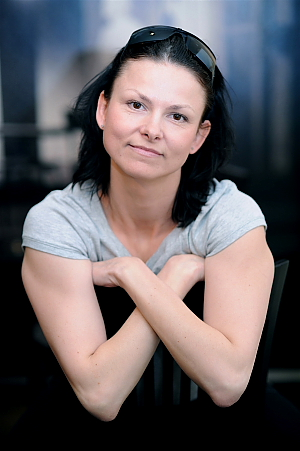 Klára Melíšková (nar. 1971) je česká herečka.